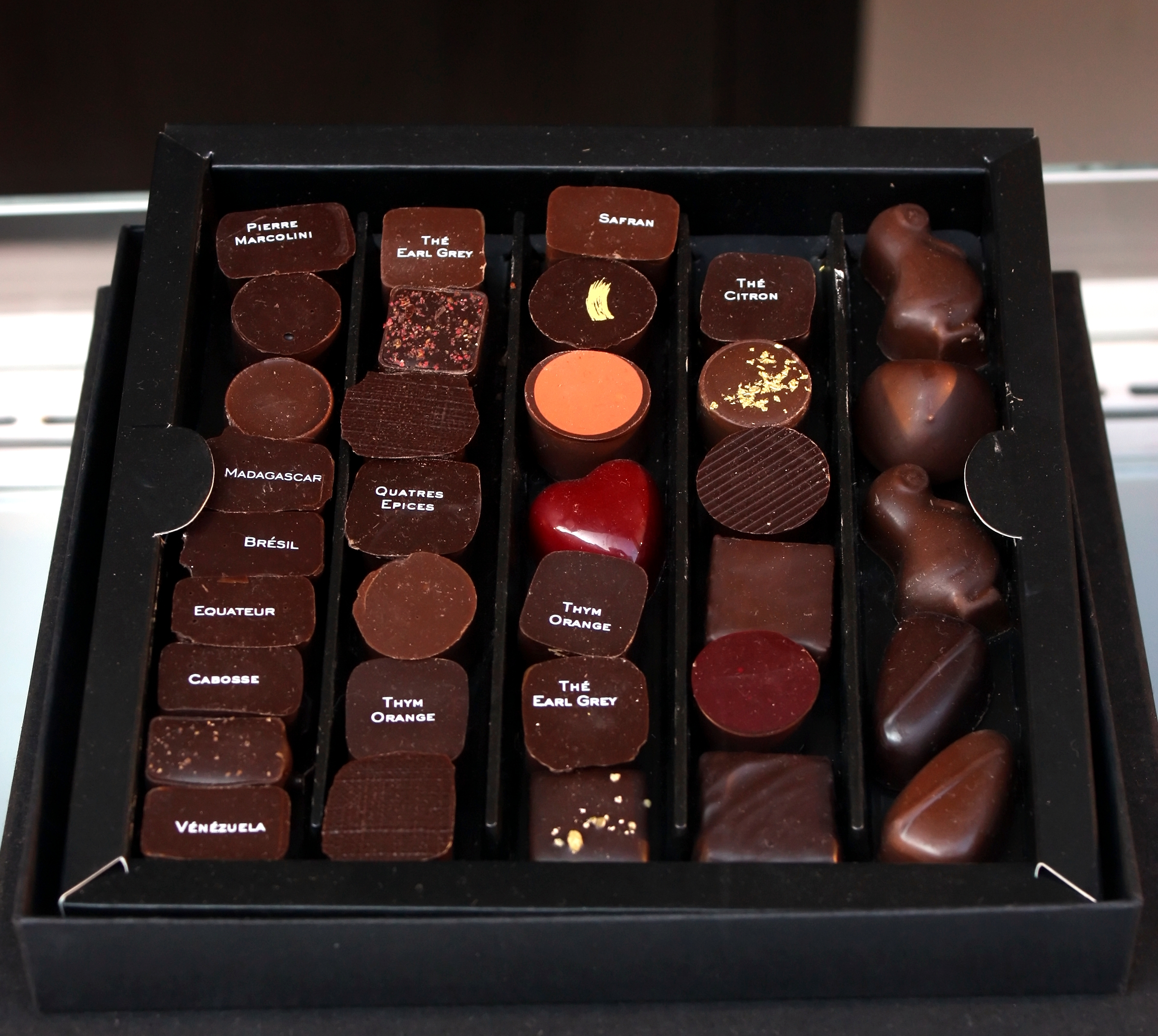 Boite de chocolats exposée en vitrine d'un magasin Pierre Marcolini.